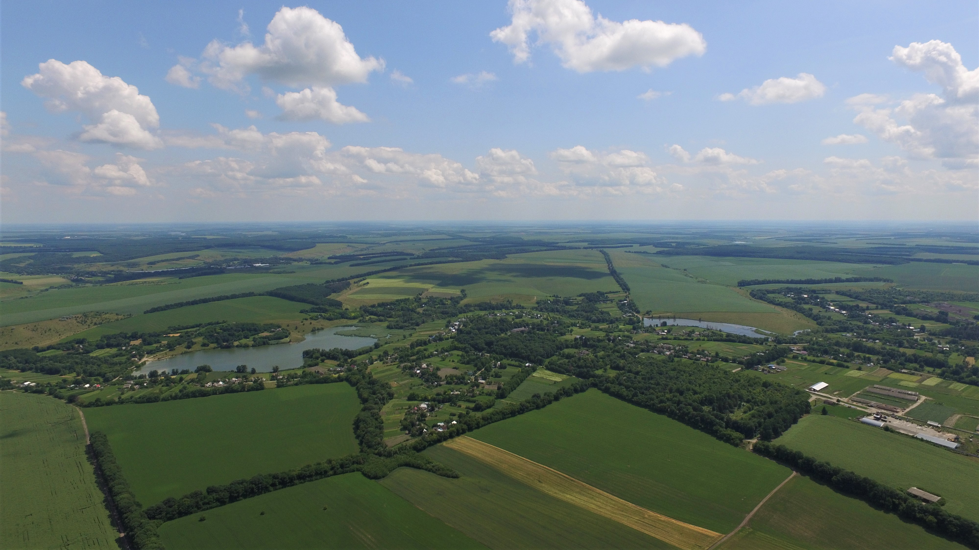 Аерофото села Заруддя (Вінницька область)